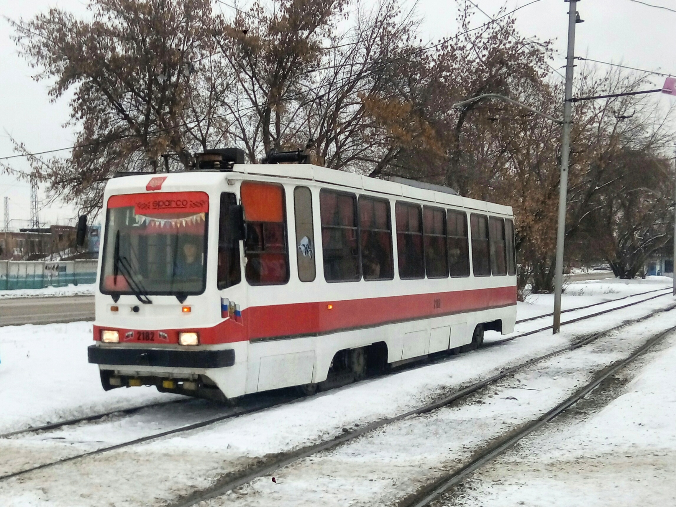 Трамвай ЛМ-99КЭ в Новосибирске на 15-м маршруте